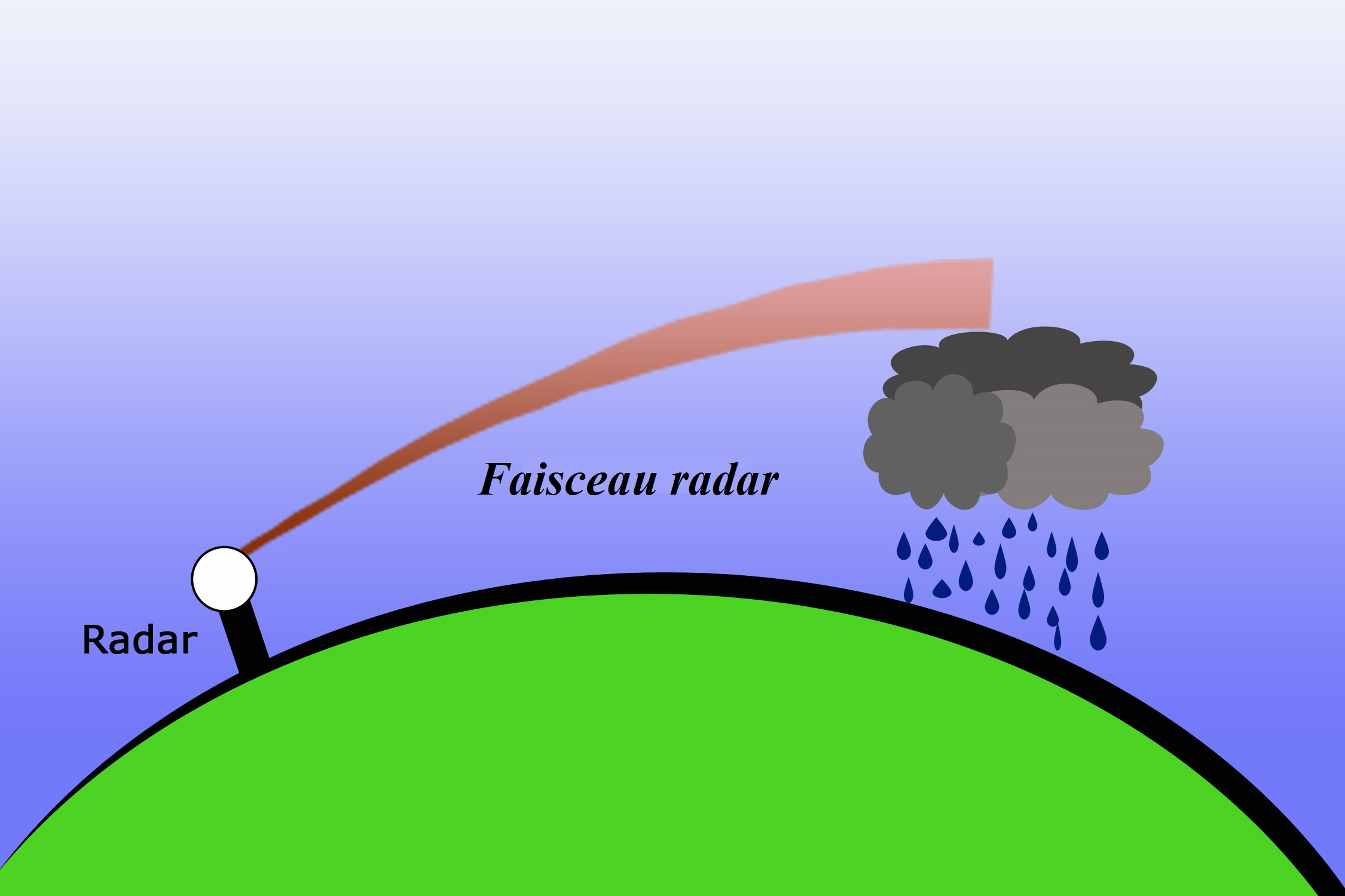 Infraréfraction d'un faisceau radar. Lorsque l'air est instable, le faisceau suit une trajectoire plus élevée que dans une atmosphère normale et peut passer au-dessus des cibles où l'opérateur peut penser que des cibles élevées sont en réalité plus basses sur l'horizon.